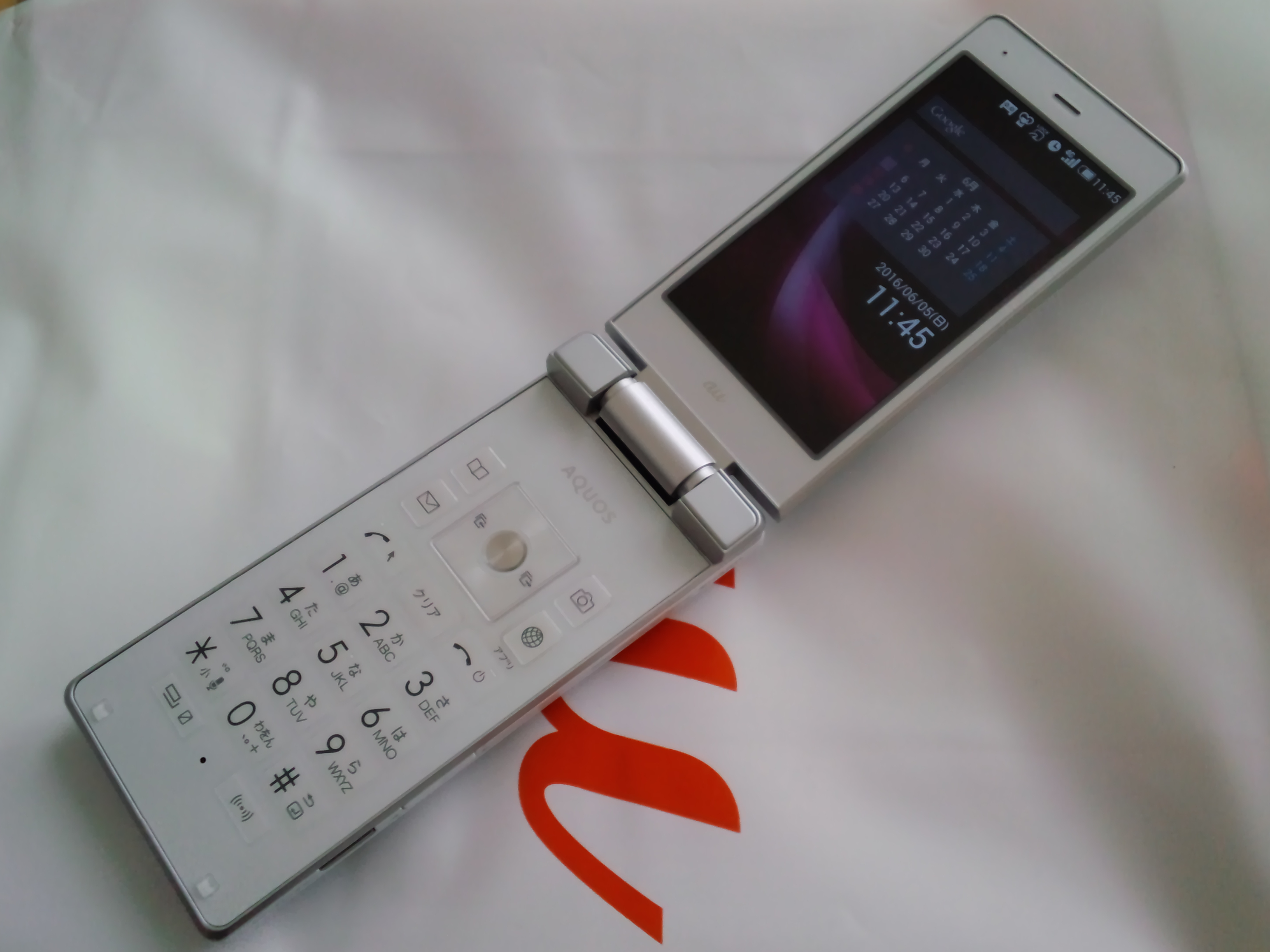 KDDI フィーチャーフォン シャープ AQUOS K SHF32（クリアホワイト） 開いた状態